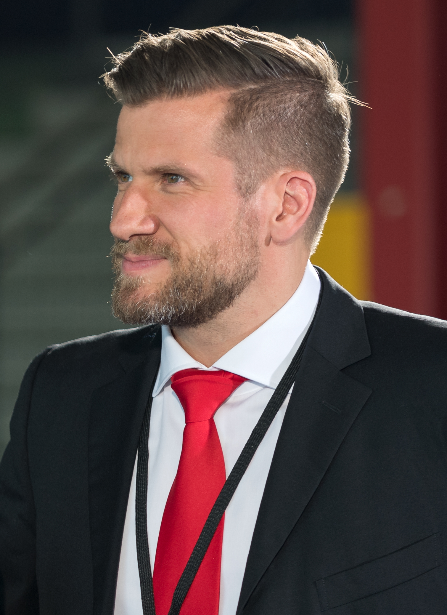 Fabian Siegismund, Webvideopreis 2017.